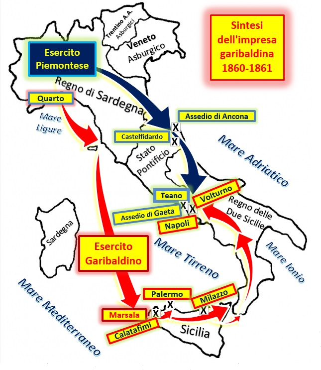 Impresa Garibaldina 1860-1861